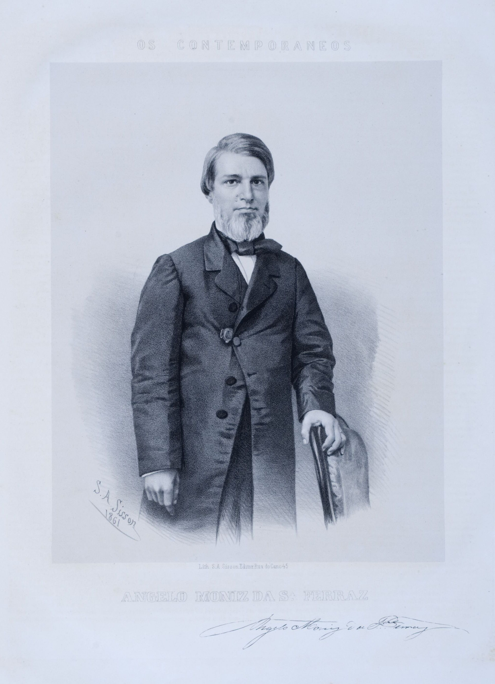 Litografia em preto e branco